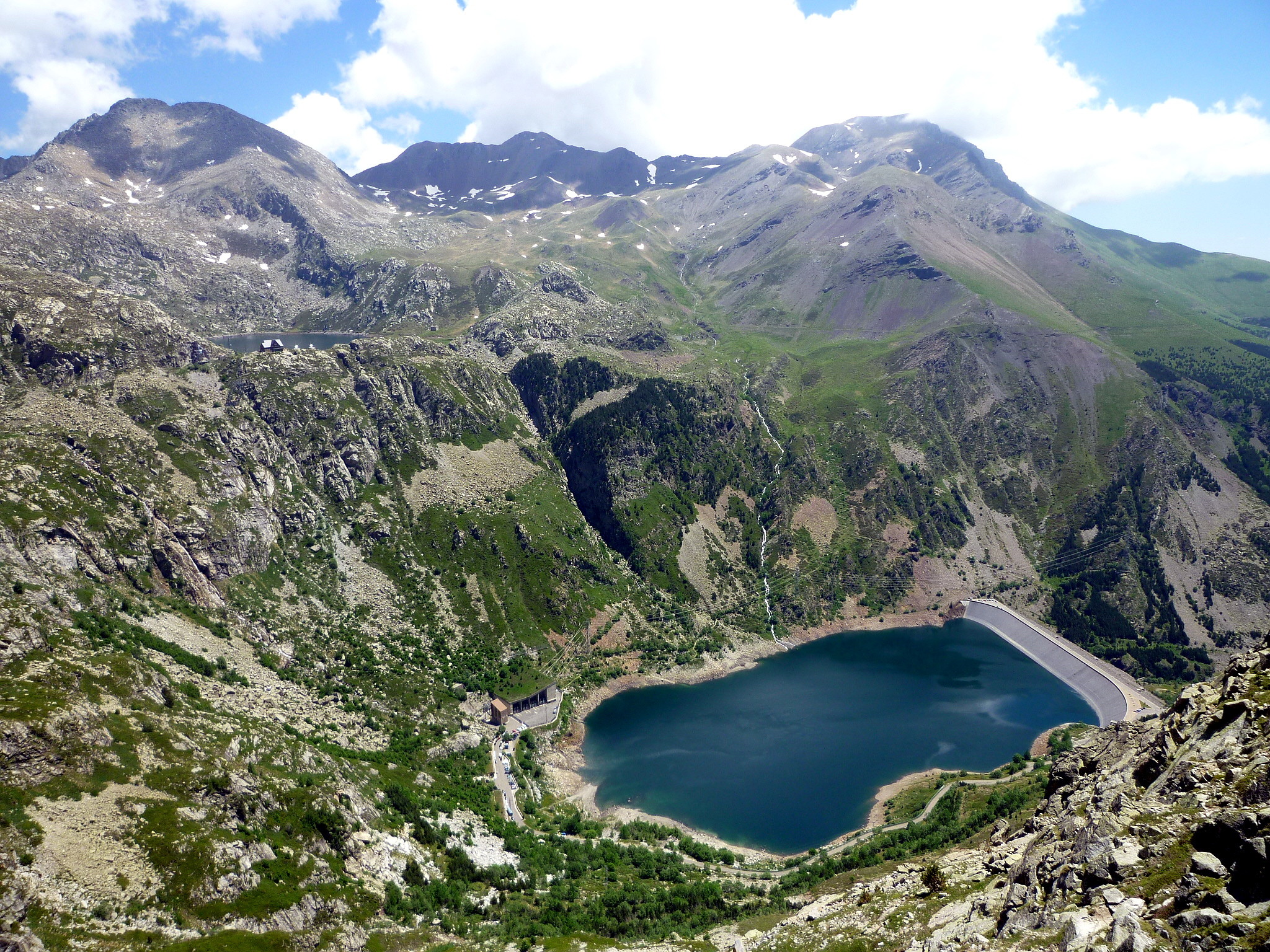 Sallente des del camí de la Collada de Fontsobirana